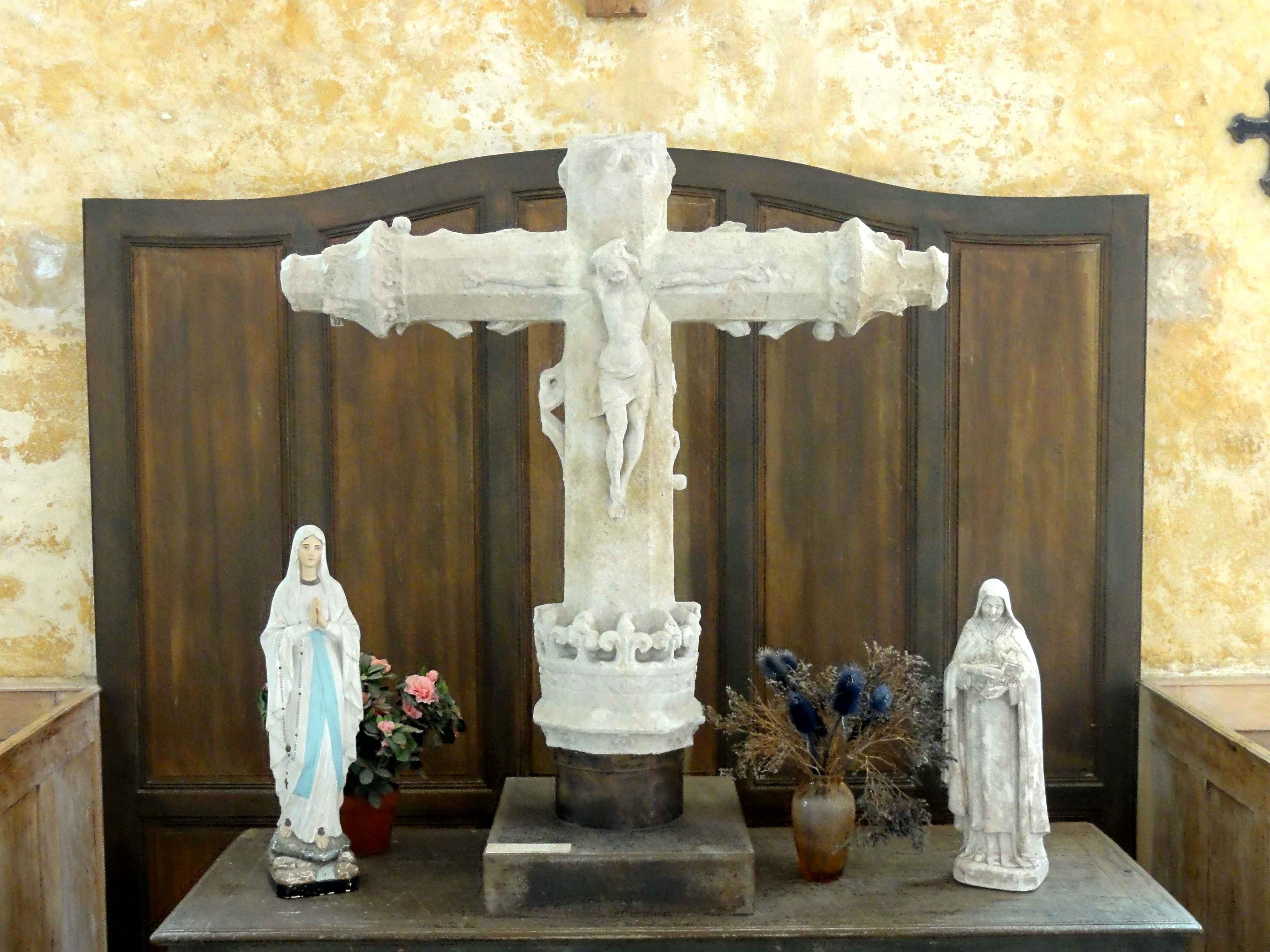 Mobilier de l'église (voir titre).